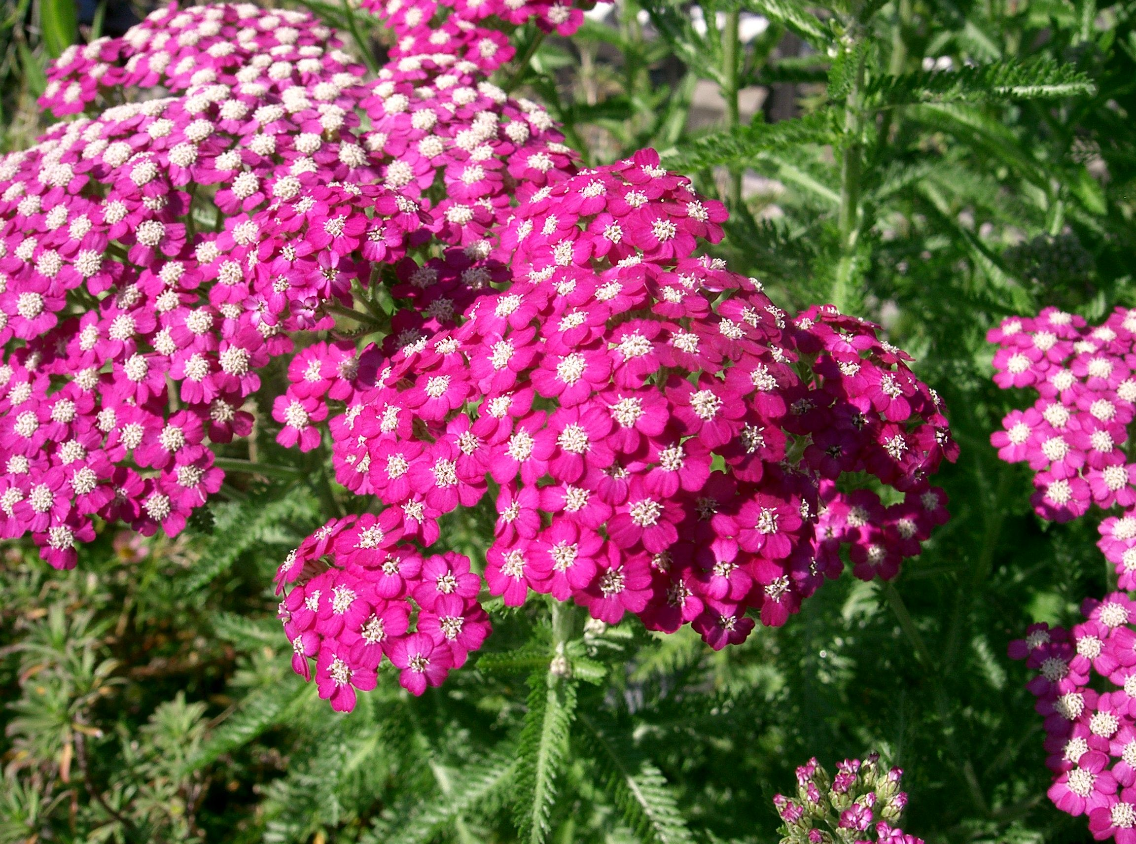 Achillea millefolium, magenta cultivar.